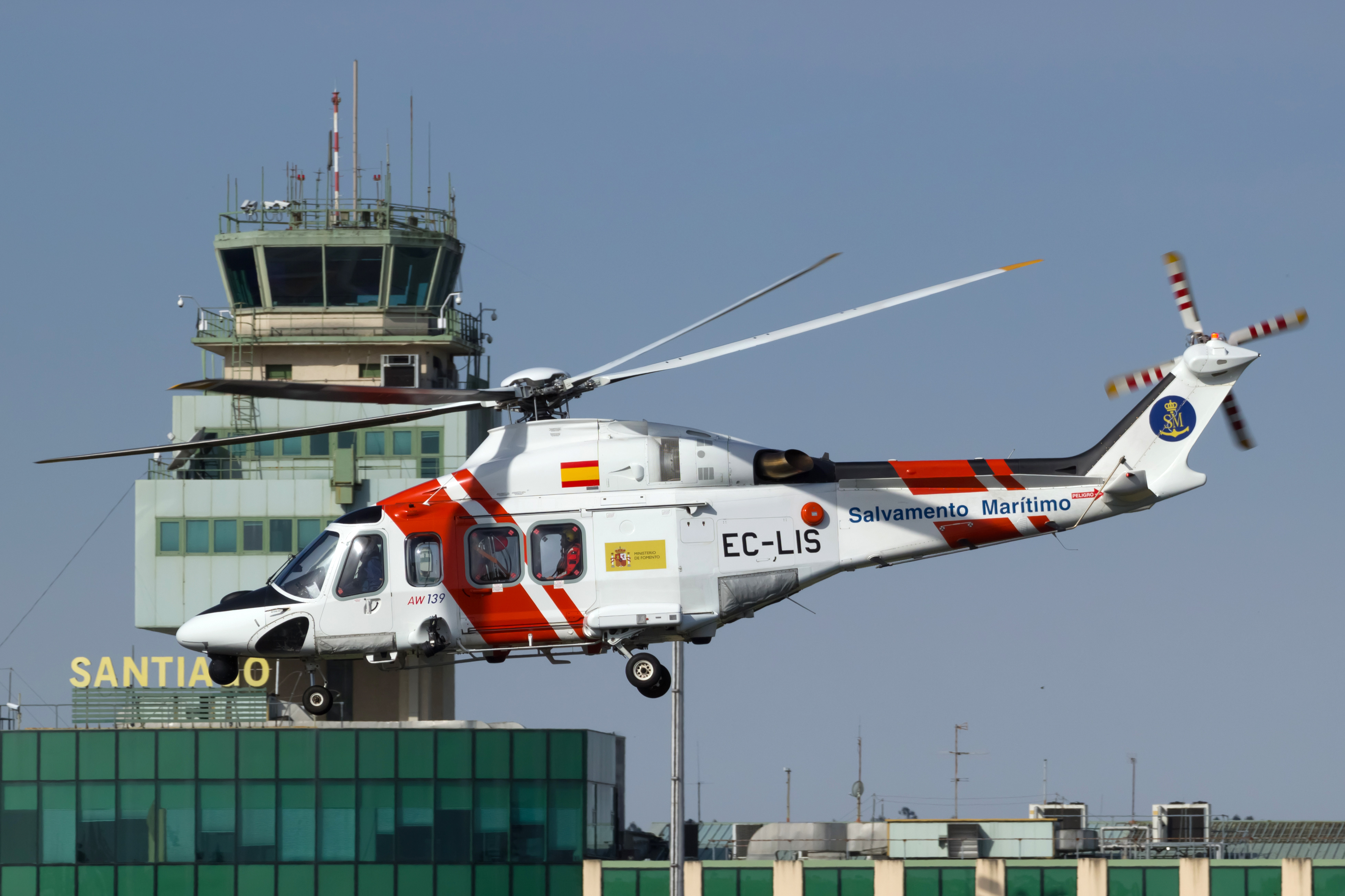 AgustaWestland AW139 despegando do aeroporto de Santiago de Compostela.